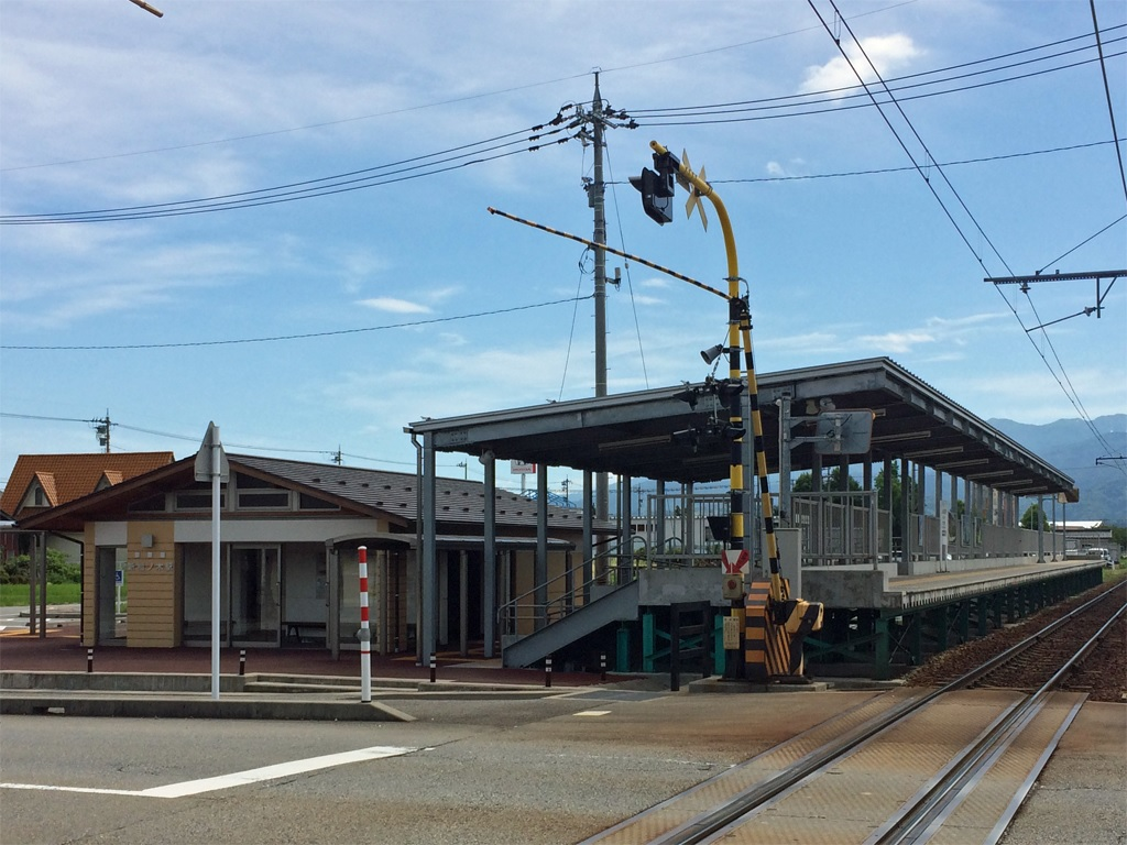 富山地方鉄道本線 新相ノ木駅